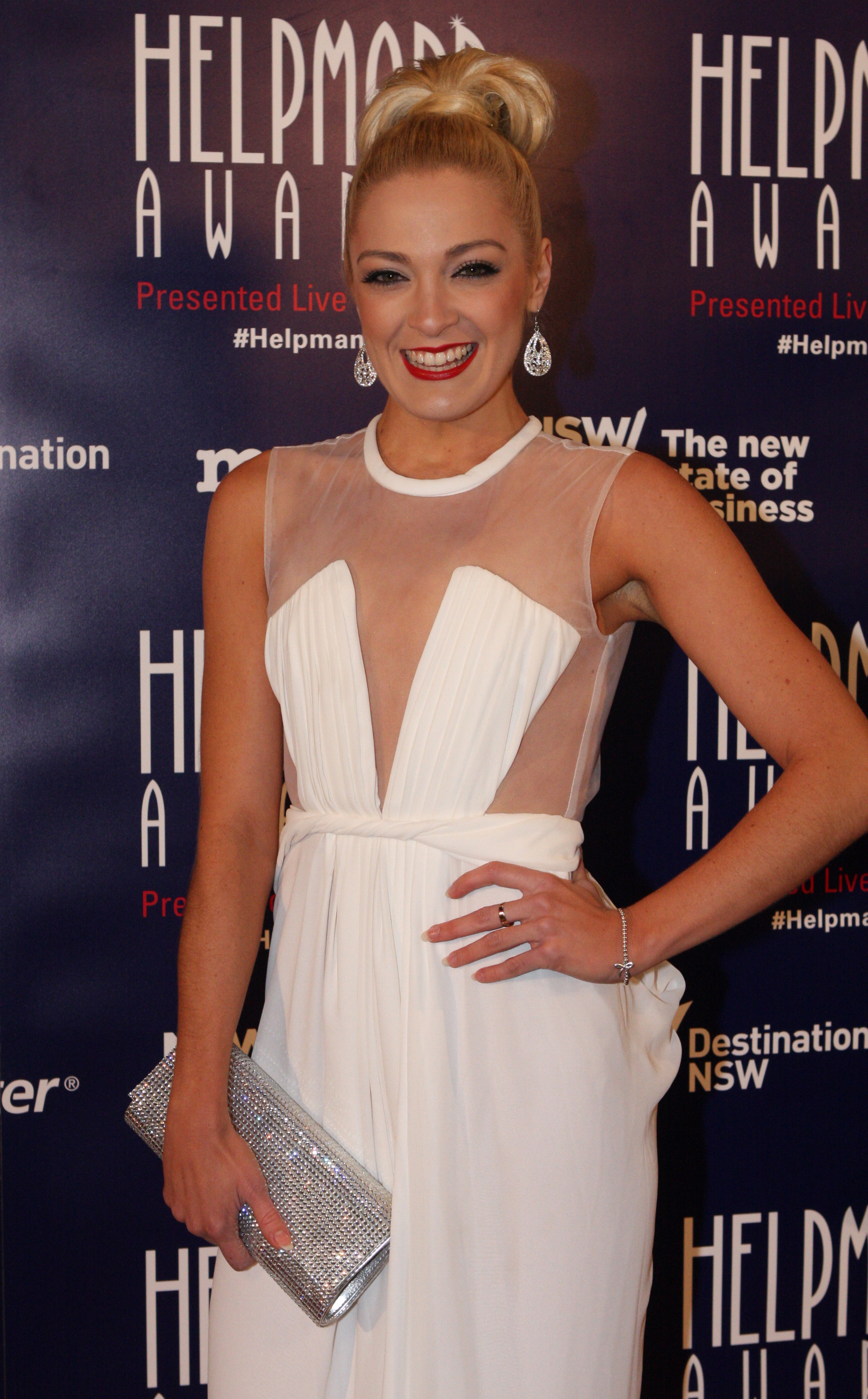 Gretel Scarlett